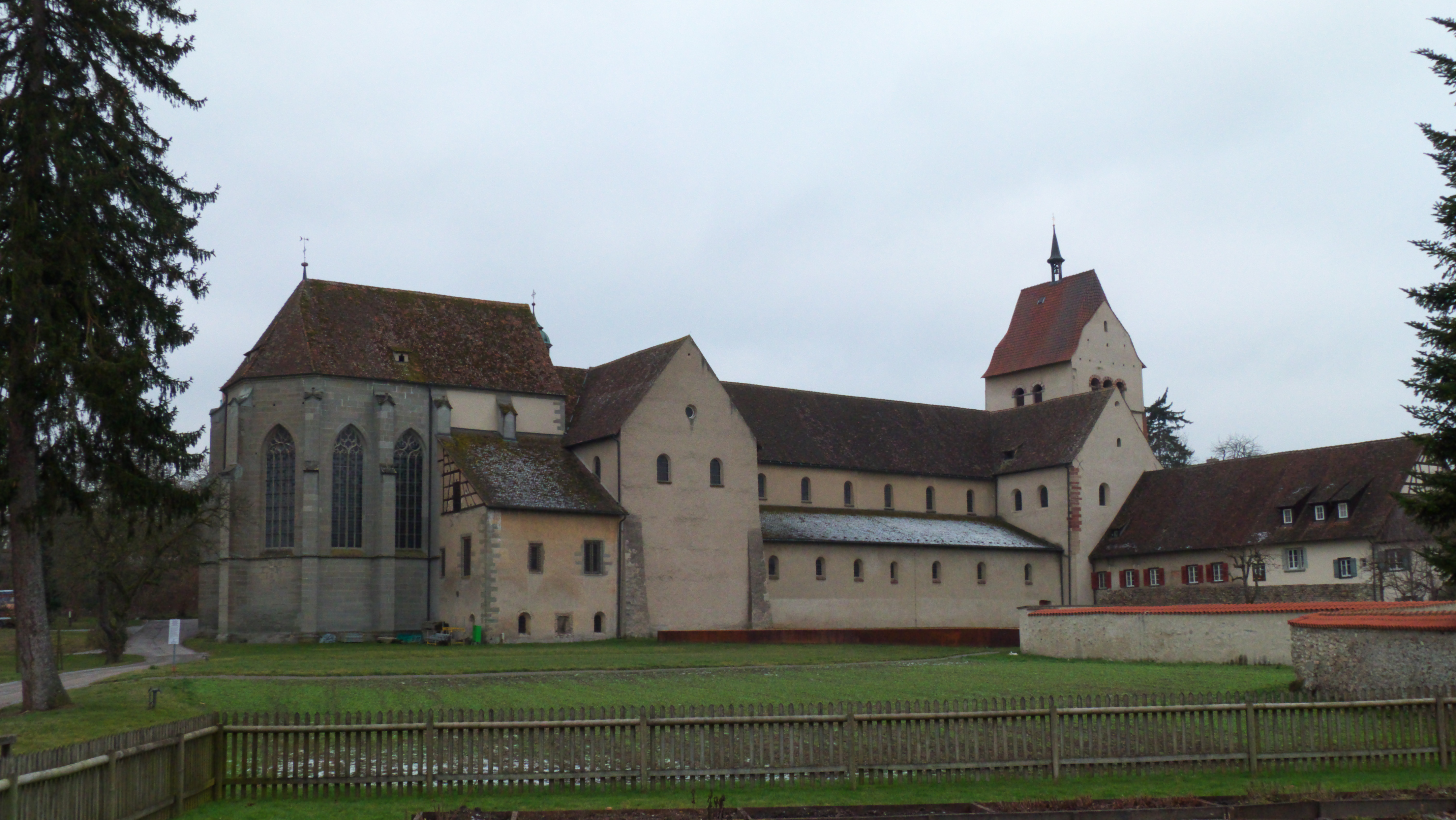 Walahfrid-Strabo-Weg